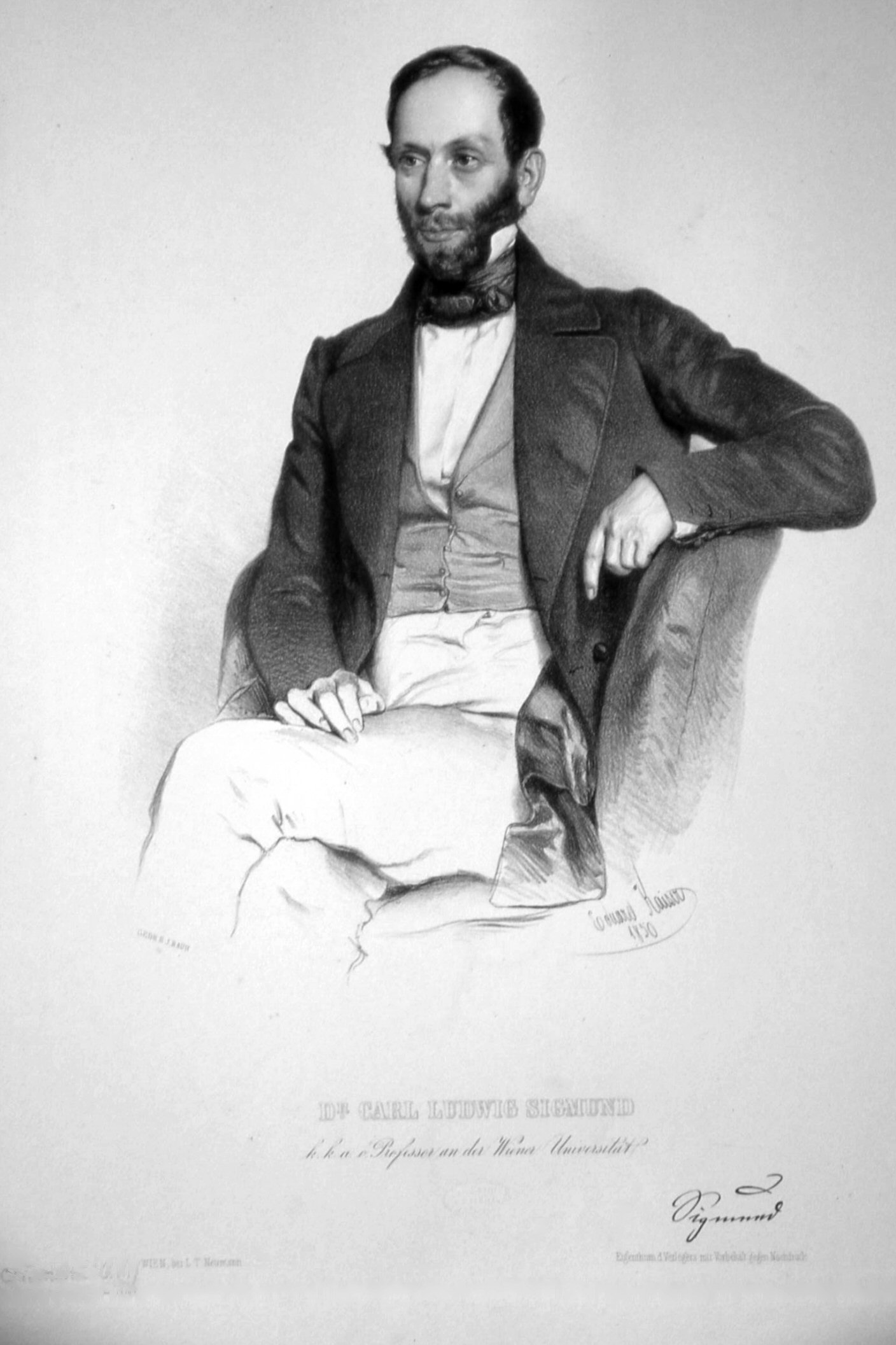 Carl Ludwig Sigmund von Ilanor (1810-1883), Professor, Mediziner, Syphilologe. Lithographie von Eduard Kaiser, 1850